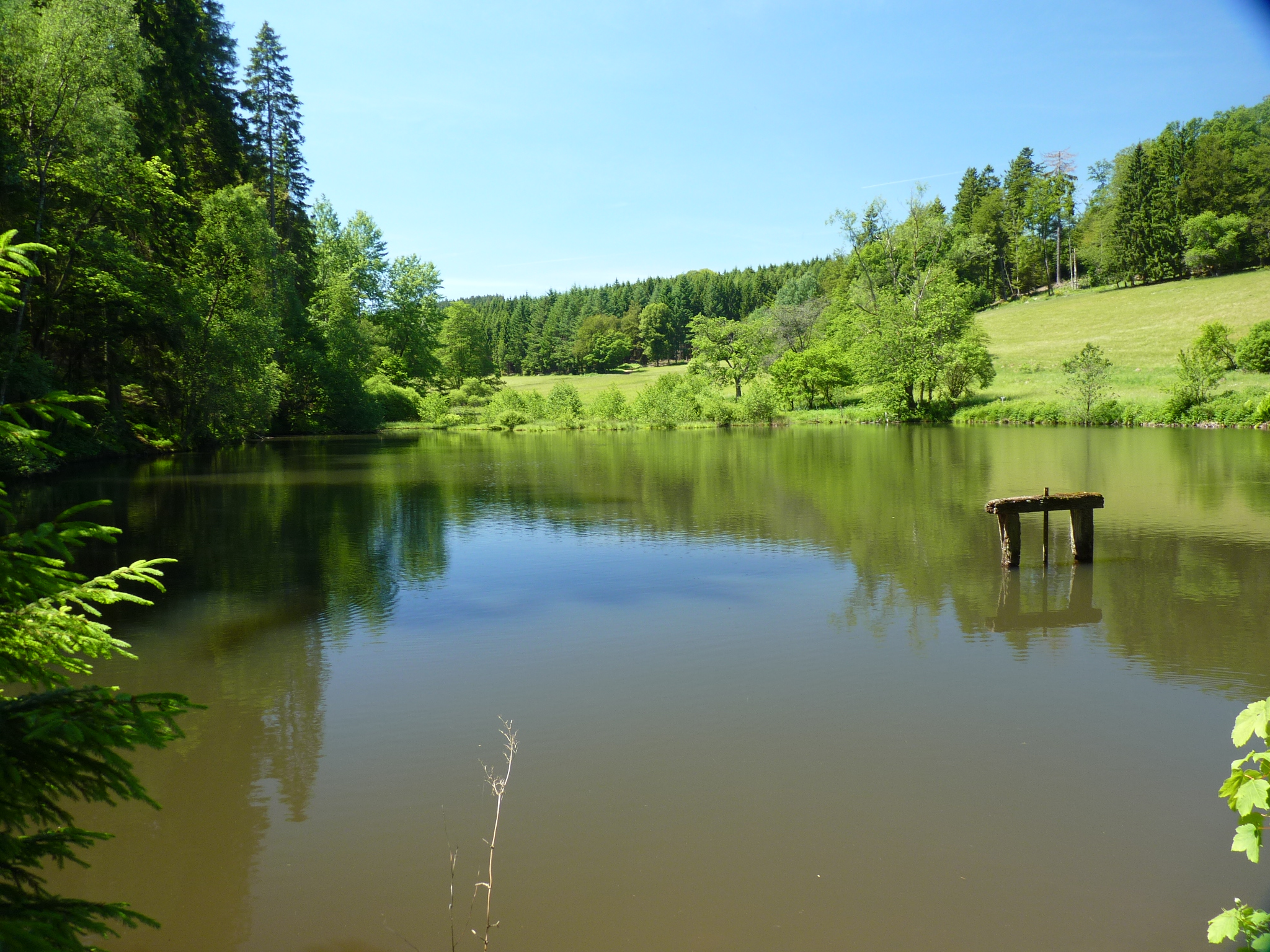 Oberer Dietzhölzweiher im Frühjahr 2015